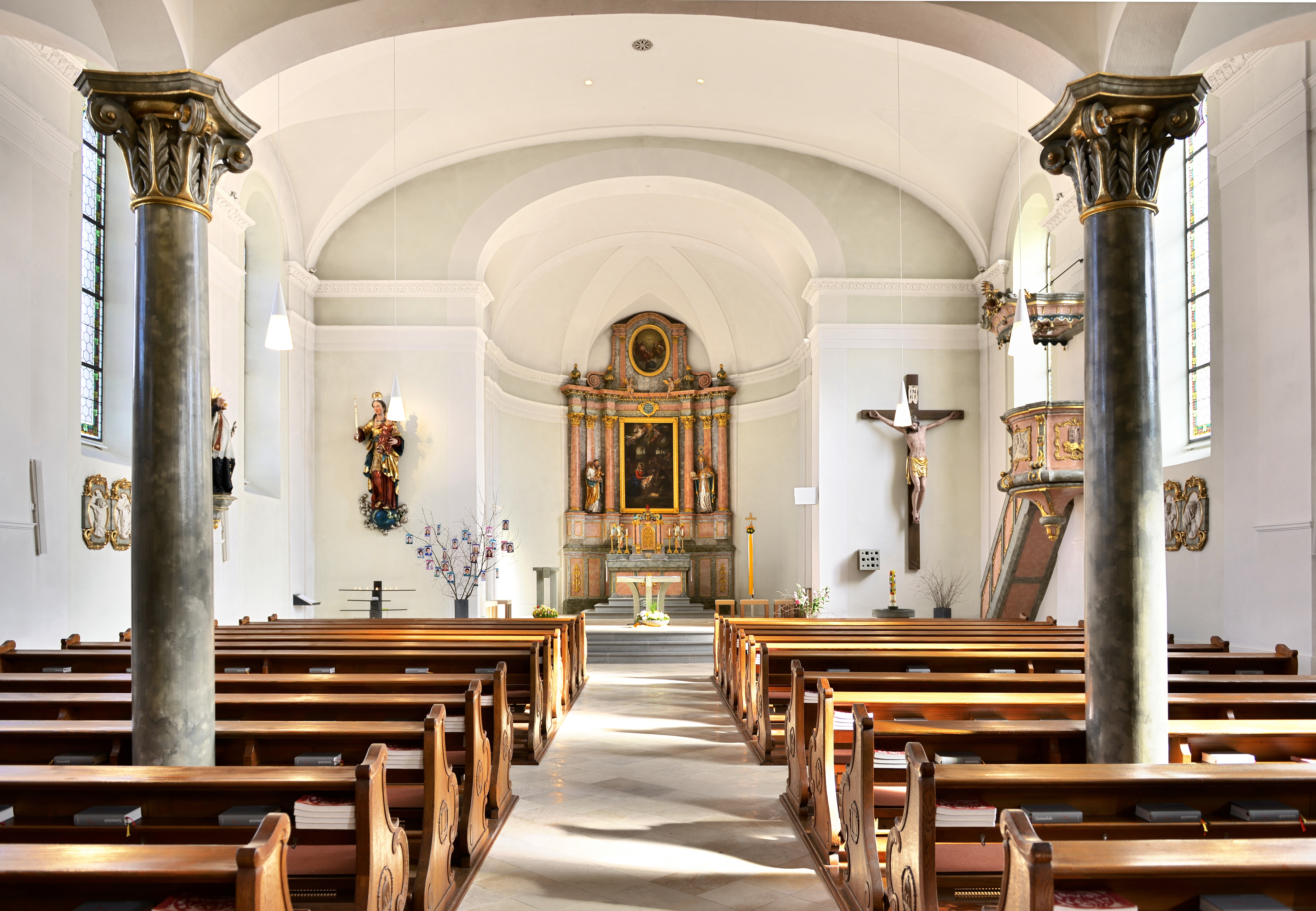 Pfarrkirche zum Hl. Xaver” rechts der Gasthof Mangold in Lochau, Vorarlberg.